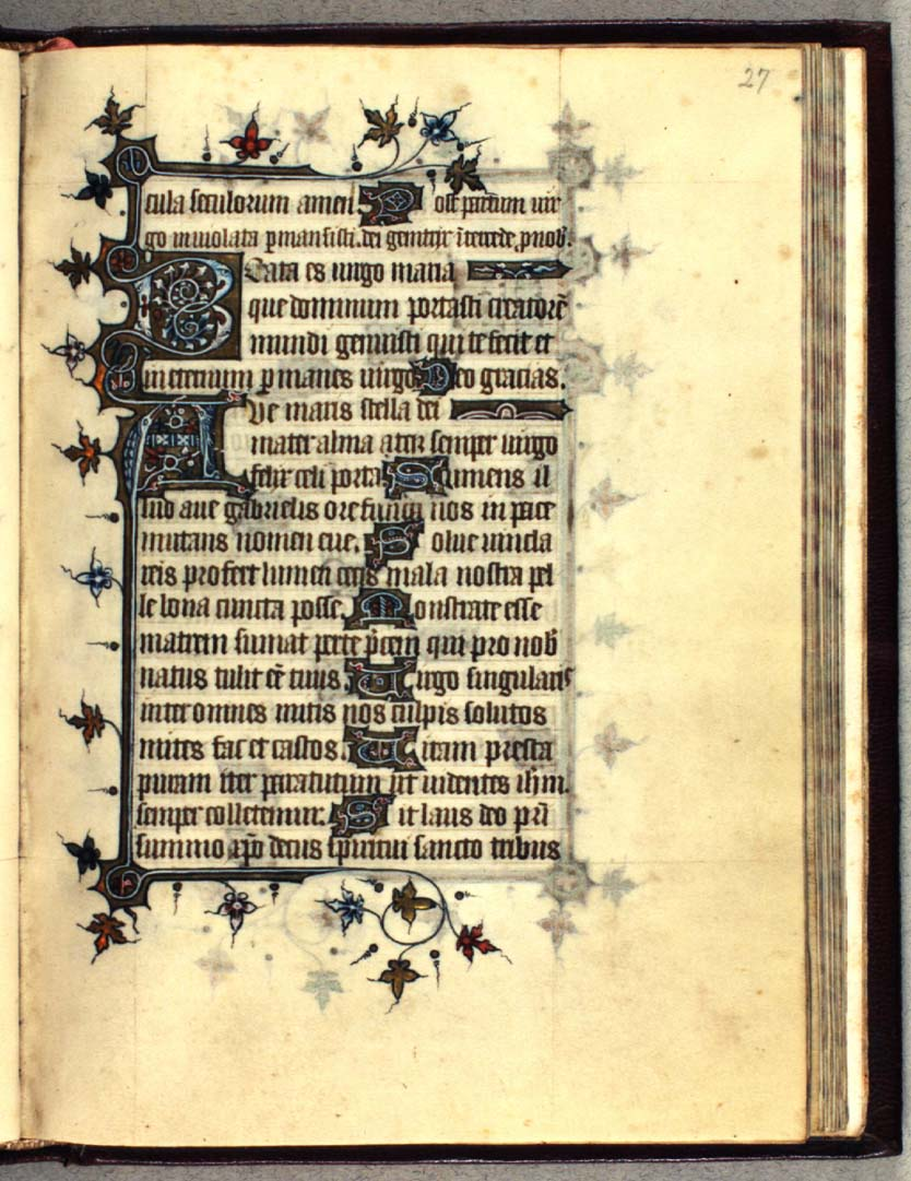 Ave maris stella, from Copenhagen MS Thott. 547 4°